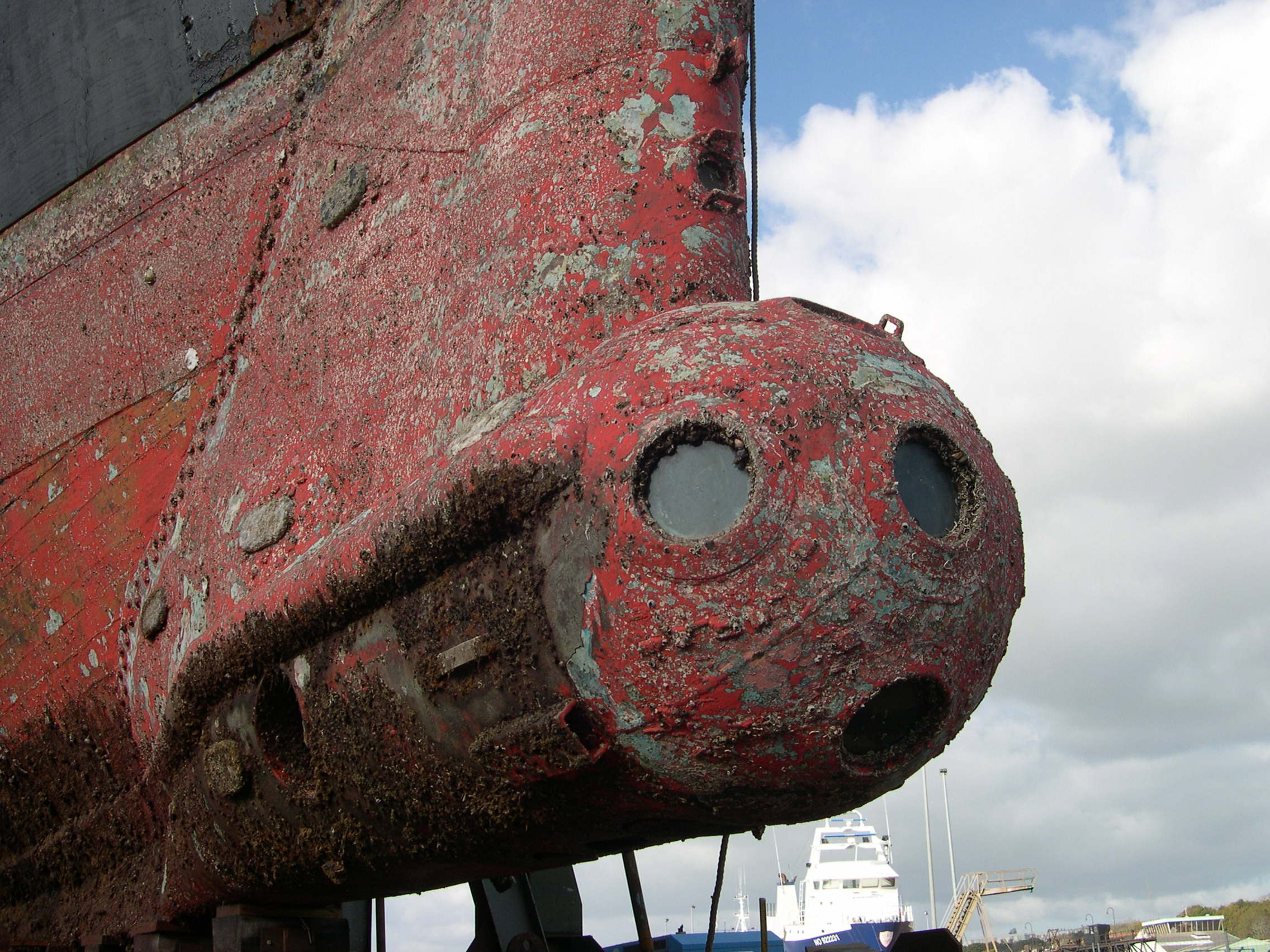 Etrave et bulbe